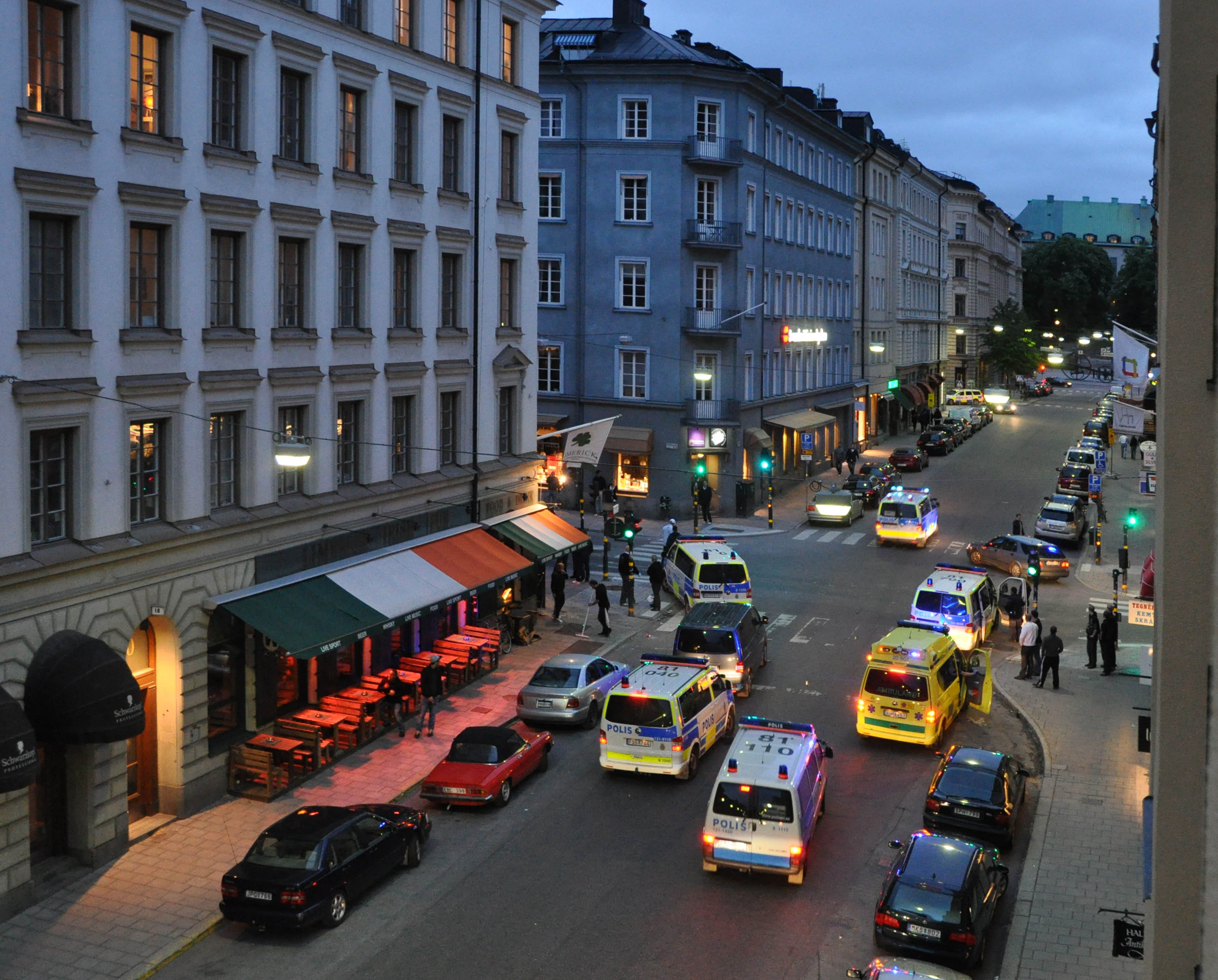 Piketen gör ett ingripande på Tegnérgatan i Stockholm efter bråk mellan fotbollshulliganer